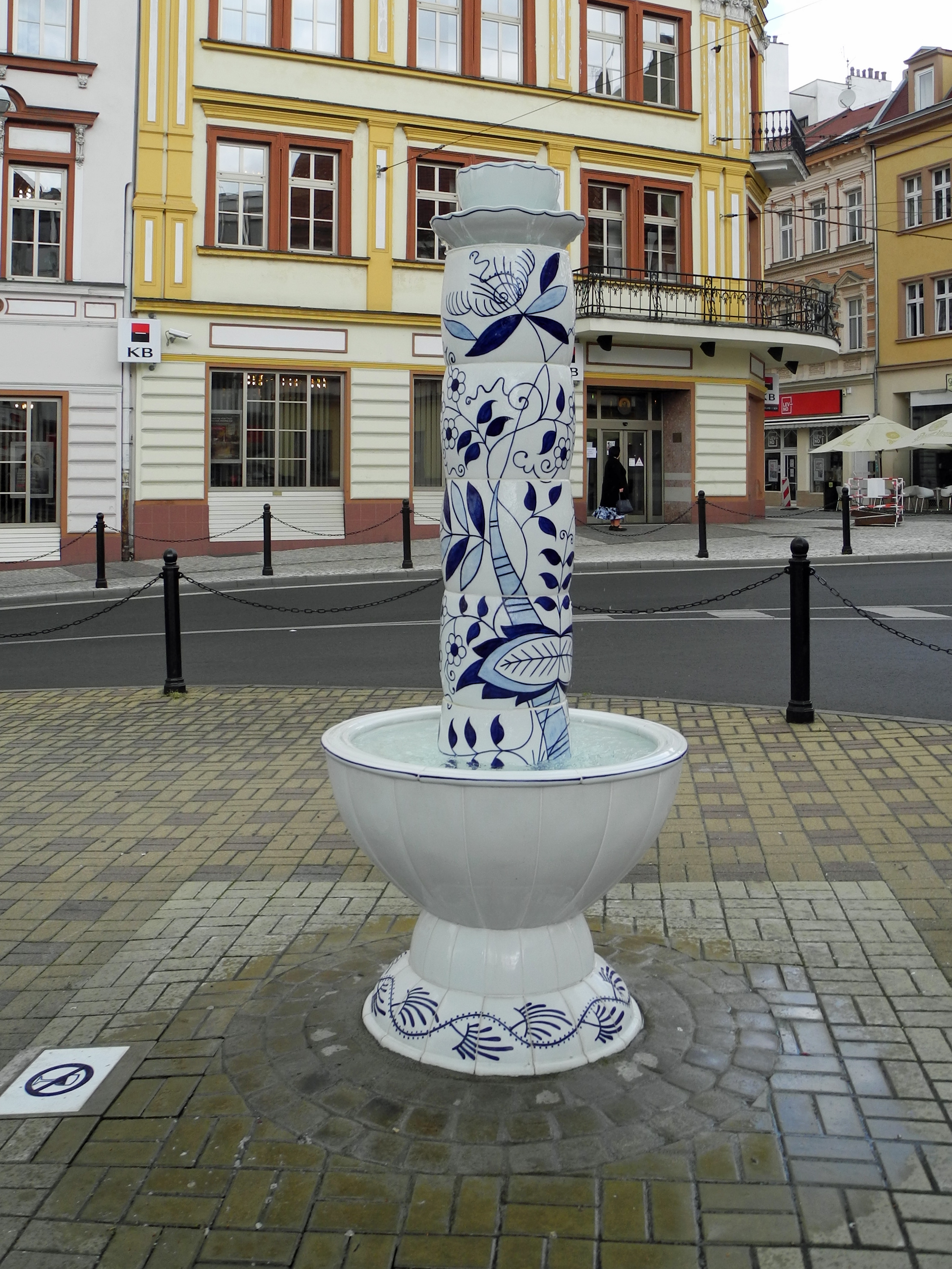 Der neue Porzellanbrunnen in Teplitz am ehem. Graupner Tor - Teplice, U Divadla, hergestellt von der firma Český porcelán Dubí (Eichwald), eingeweiht am 8. August 2018, entworfen vom Bildhauer Jiří Kožíšek (* 1955), siehe [1] und [2].